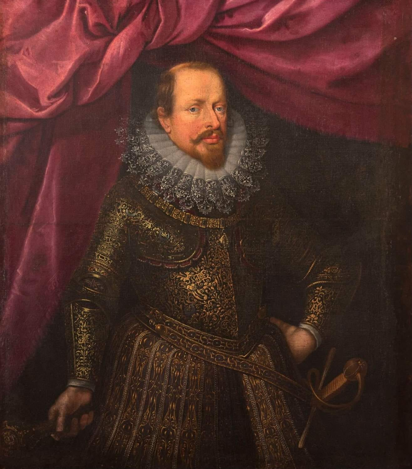 Vincenzo, Duke of Mantua / Vincenzo I Gonzaga (1562-1612)